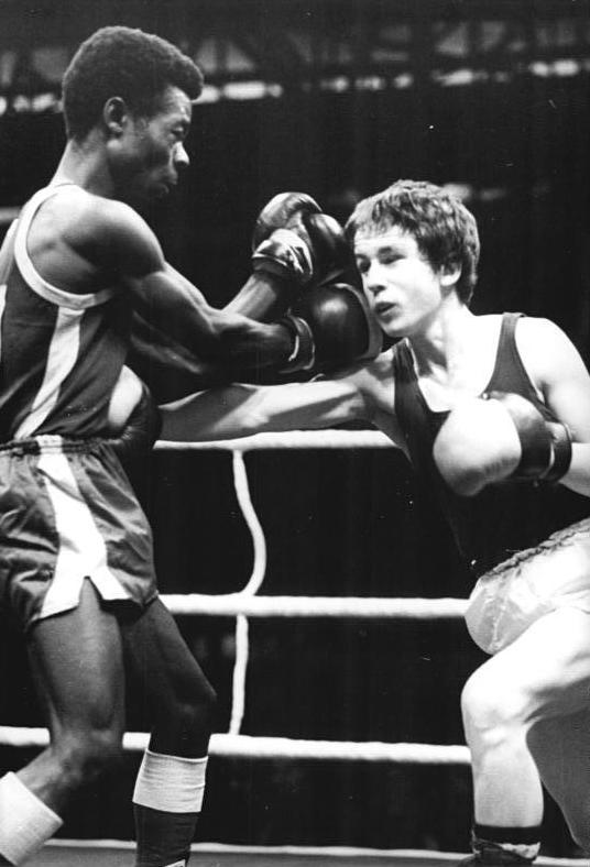 Antonio Bernardo, Torsten Schlosser ADN-ZB Lehmann 10.3.83 Halle: XII. Internationales Boxturnier um den Chemiepokal-Mit einer konzentrierten Leistung wurde der Berliner TSC-Sportler Torsten Schlosser (r.) RSC-Sieger in der zweiten Runde über Manuel Antonio Bernardo (Volksrepublik Angola) und erreichte damit das Finale im Halbfliegengewicht.